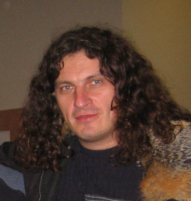 Андрей Кузьменко (Скрябін) в холле Торвара перед концертом The Cure (Warszawa, 18-02-2008)